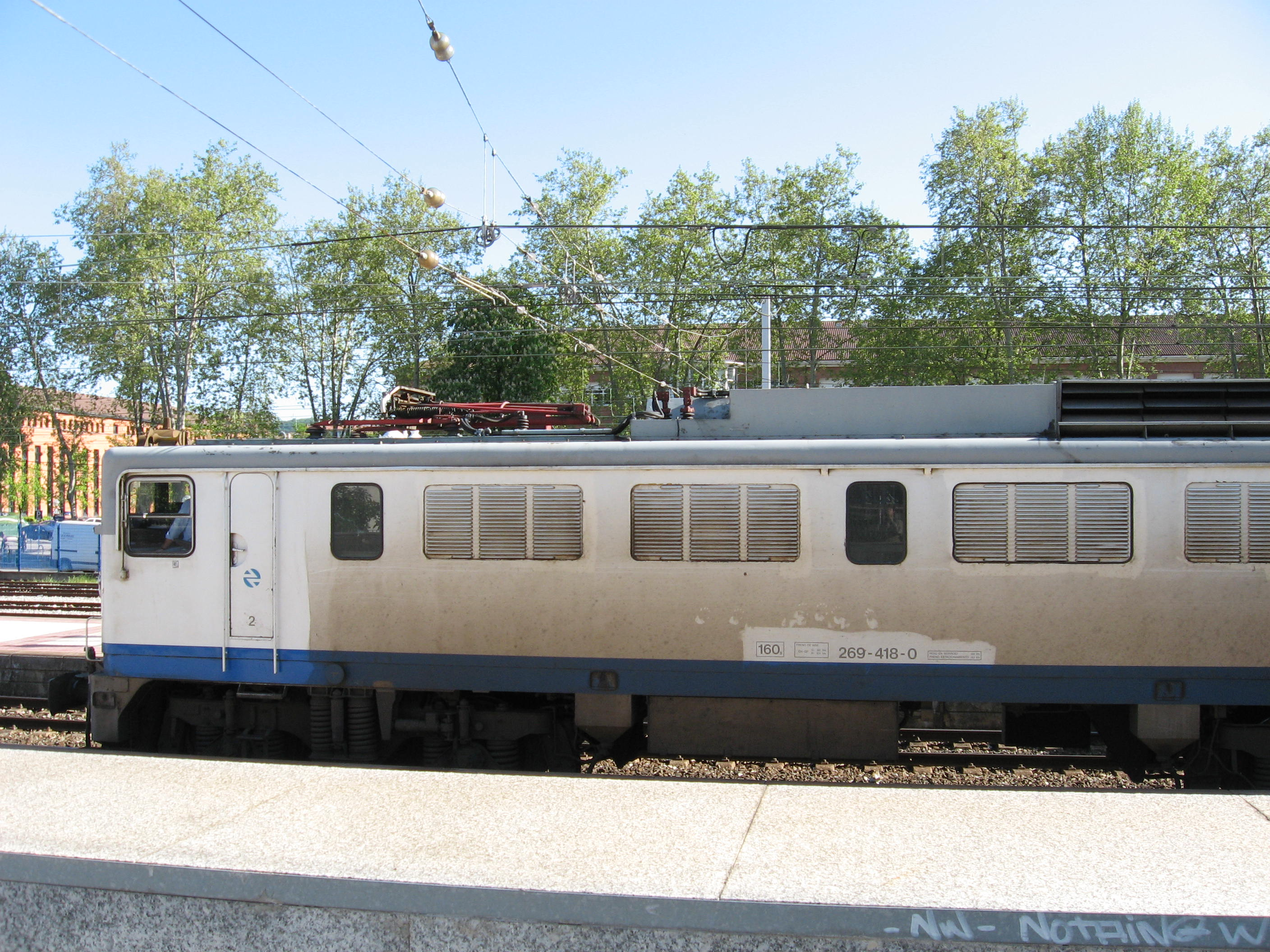 Desc: Locomotora 269.418 en la estación de Vitoria